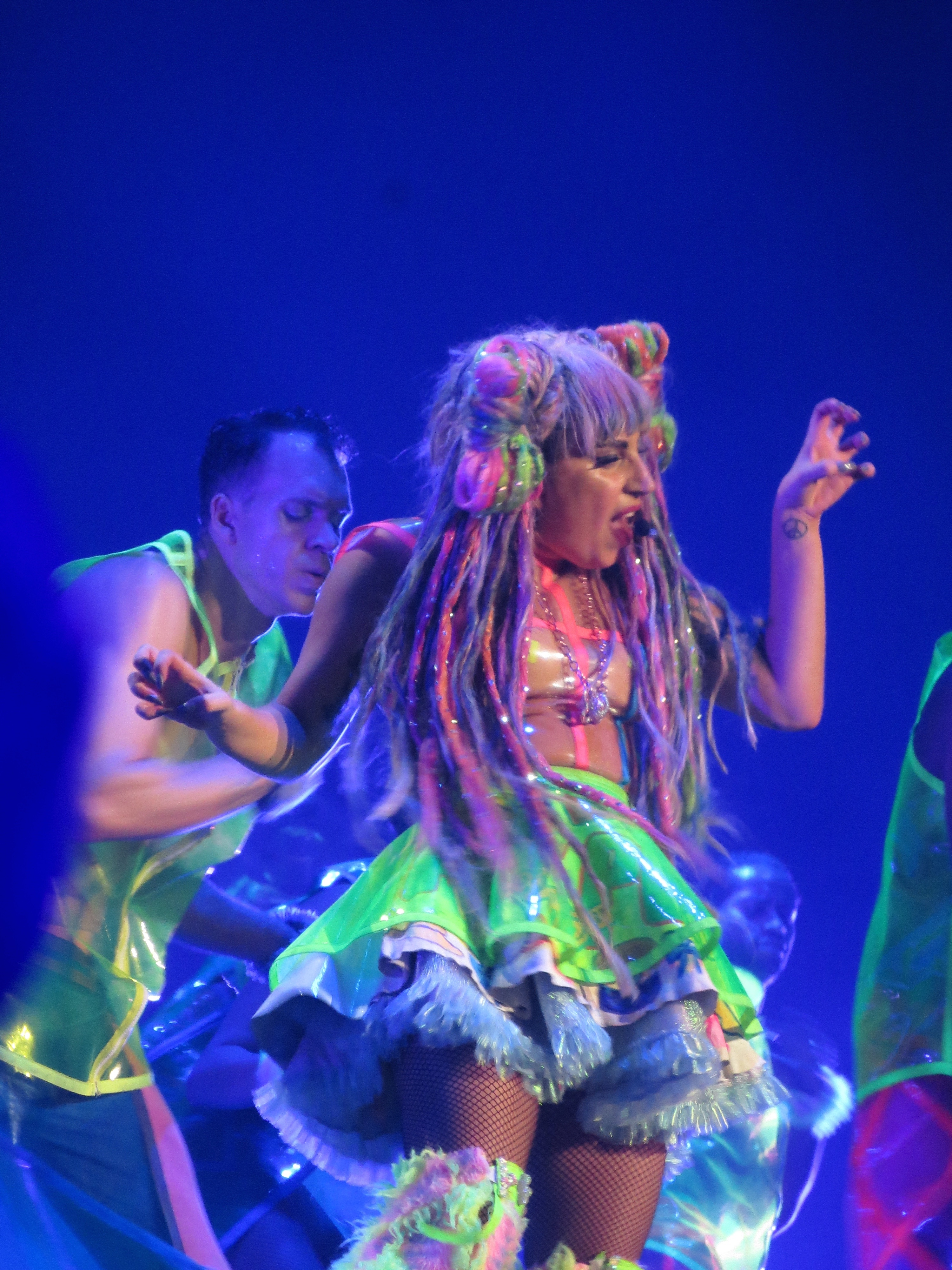 Lady GaGa 20